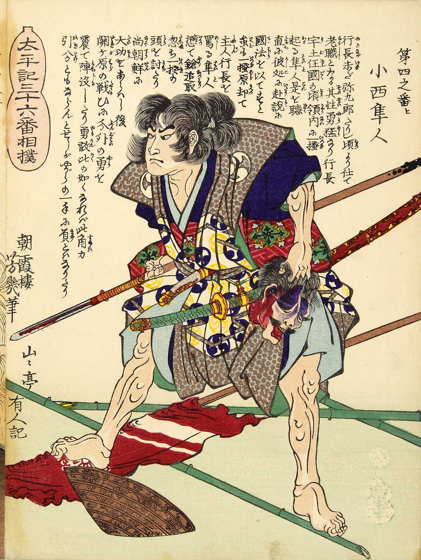 『太平記三十六番相撲第四之番と「小西隼人（小西行景）」